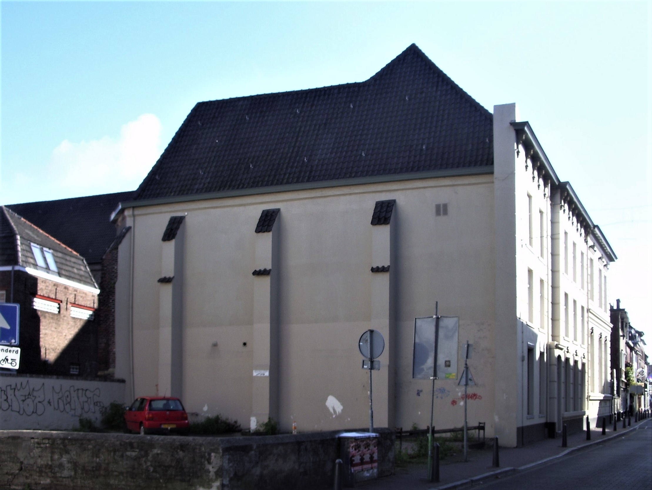 Beggardenkapel Roermond